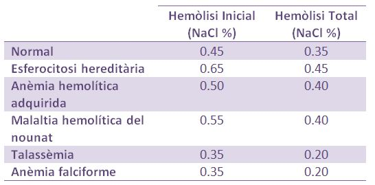 Resultat anòmals en el test de fragilitat òsmòtica